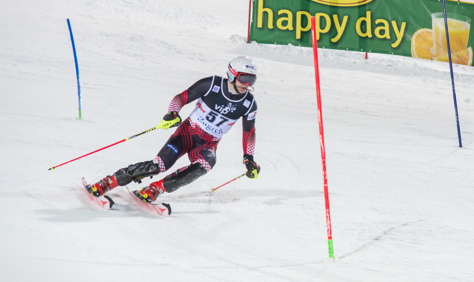 ZUBCIC Filip